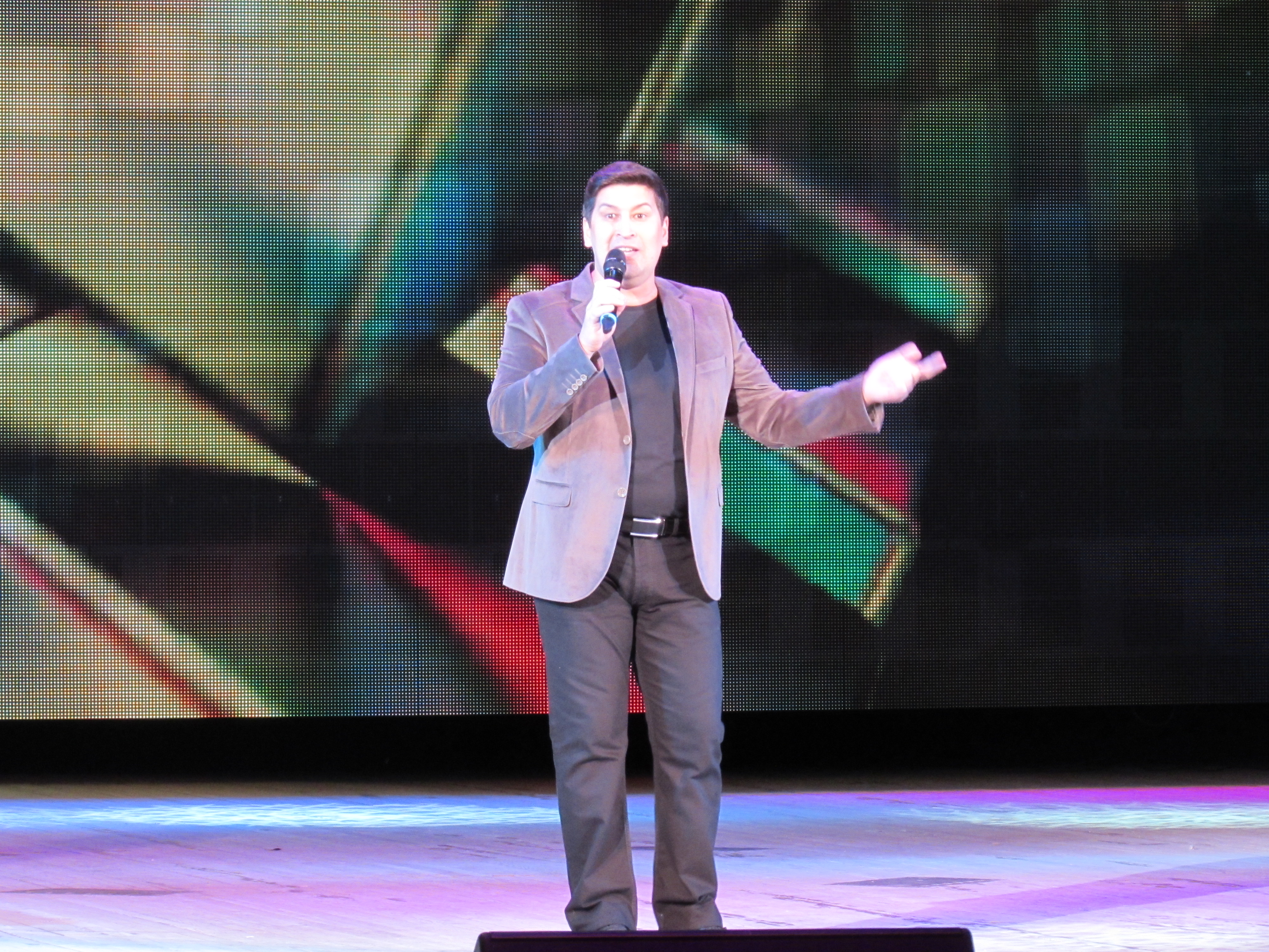 Концерт "Песня года - 2015", Радио "Юлдаш", Уфа, ГКЗ "Башкортостан" Башҡортса: "Йыл йыры 2015" концерты, "Юлдаш" радиоһы, Өфө, "Башҡортостан" ДКЗ